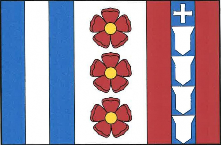 Vlajka, Libějovice, okres Strakonice